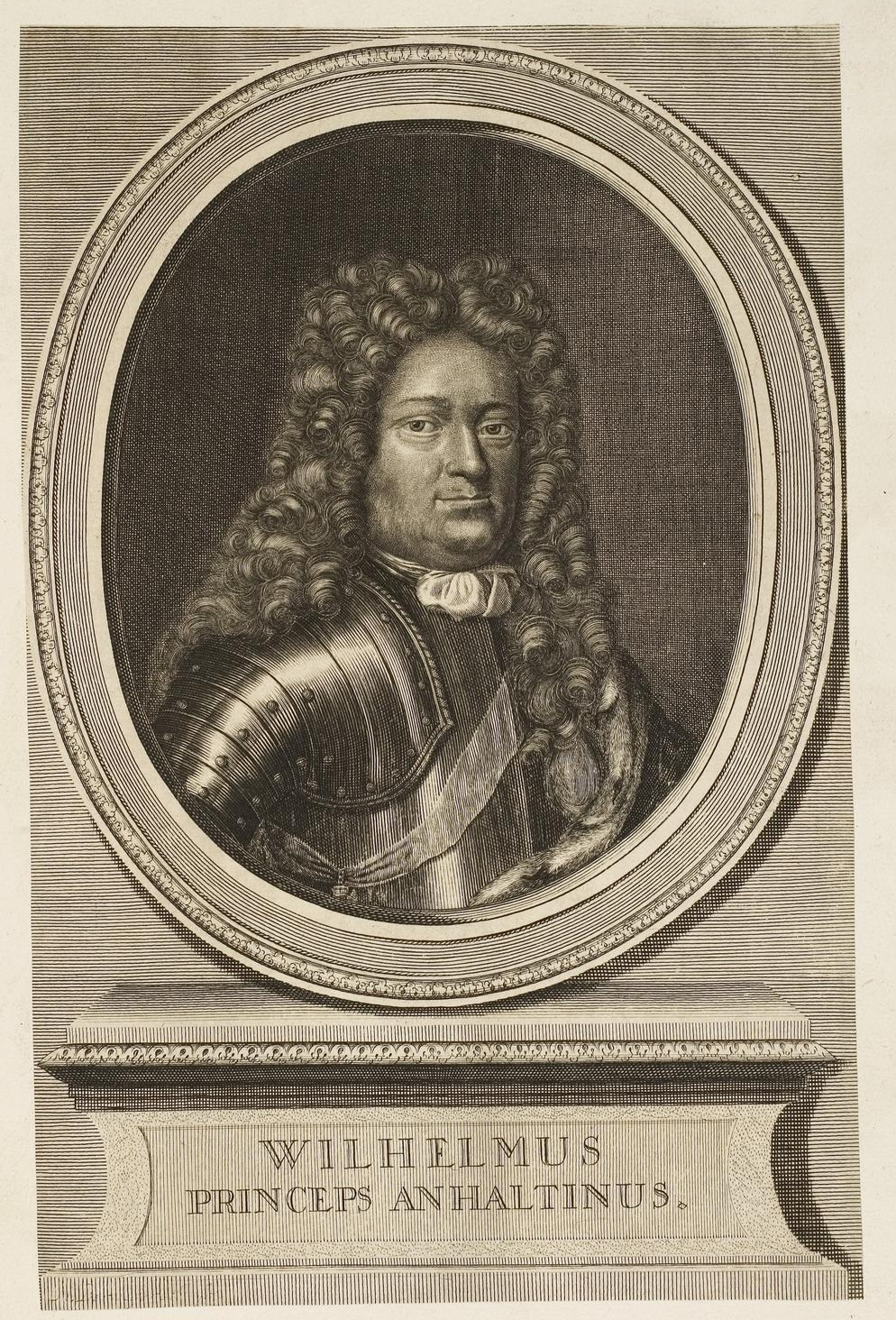 Grafik aus dem Klebeband Nr. 1 der Fürstlich Waldeckschen Hofbibliothek Arolsen Motiv: Wilhelm von Anhalt-Bernburg-Harzgerode